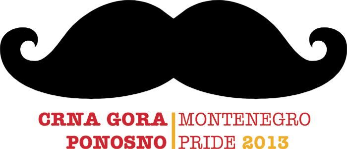 LGBT Povorka Ponosa, Crna Gora 2013